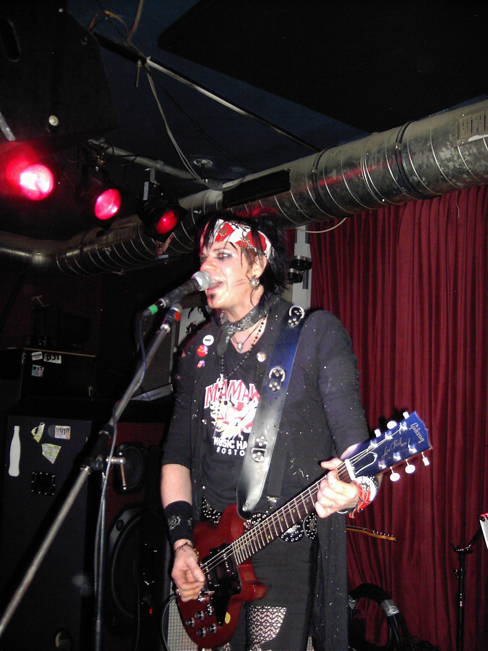 Matthau Mikojan live in Stuttgart, Keller Club, 16.10.2008